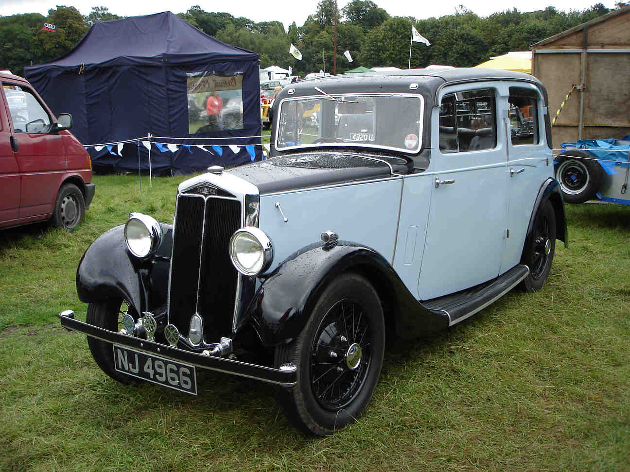 Lanchester Ten 1935-36